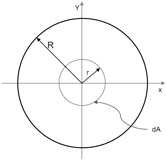 Skizze für die Berechnung: Flaechentraegheitsmoment eines Kreises